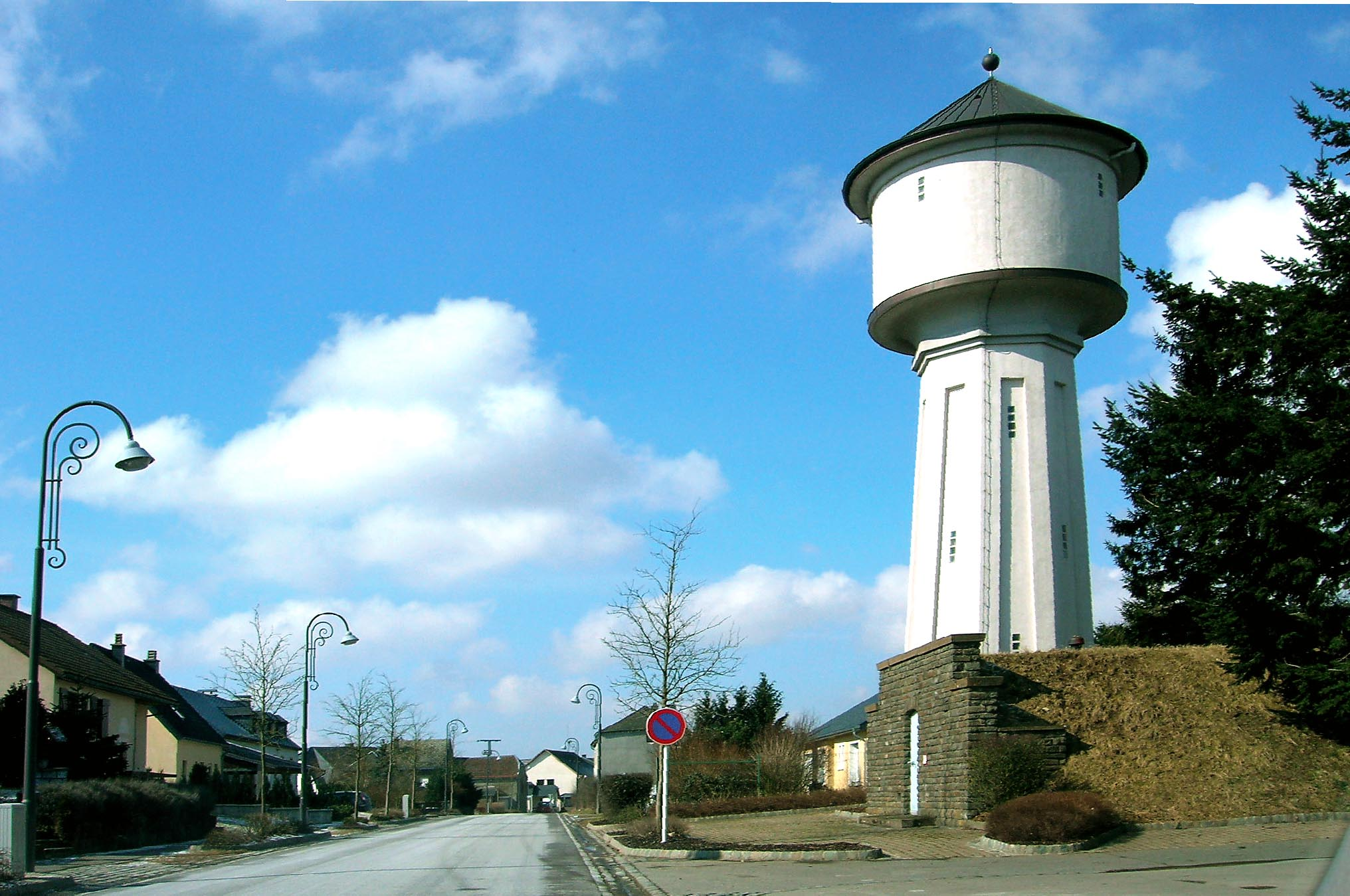 Heischent, de Waassertuerm.